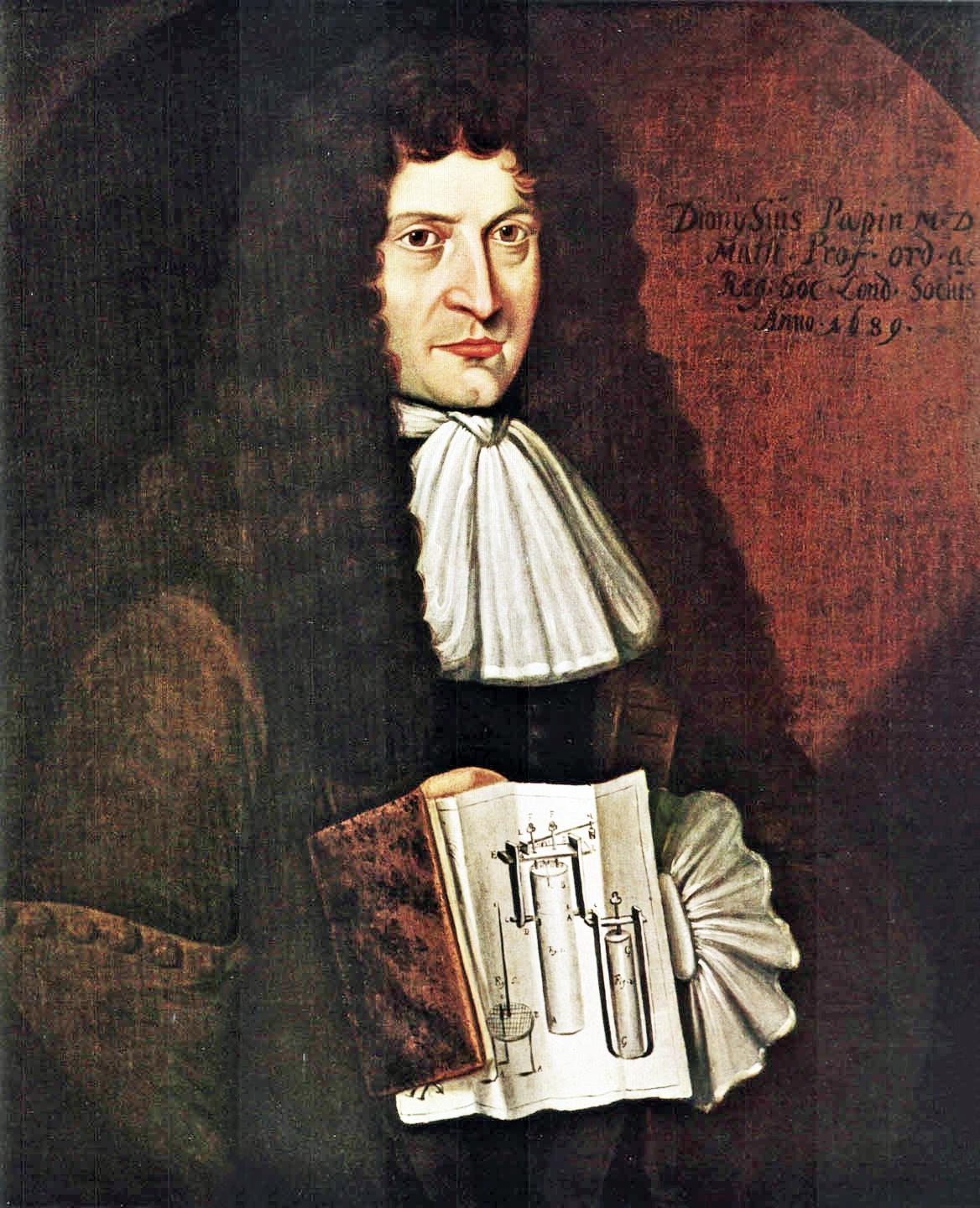 Portrait von Denis Papin, 1689 – Die Inschrift bedeutet: DionySius Papin M[edicinae] D[octor], Math. Prof. ord. ac Reg. Soc. Lond. Socius [Mathematicae Professor ordinarius ac Regiae Societatis Londini Socius, (dt.: Ordentlicher Professor der Mathematik und Mitglied der königlichen Gesellschaft zu London)], Anno [im Jahr] 1689